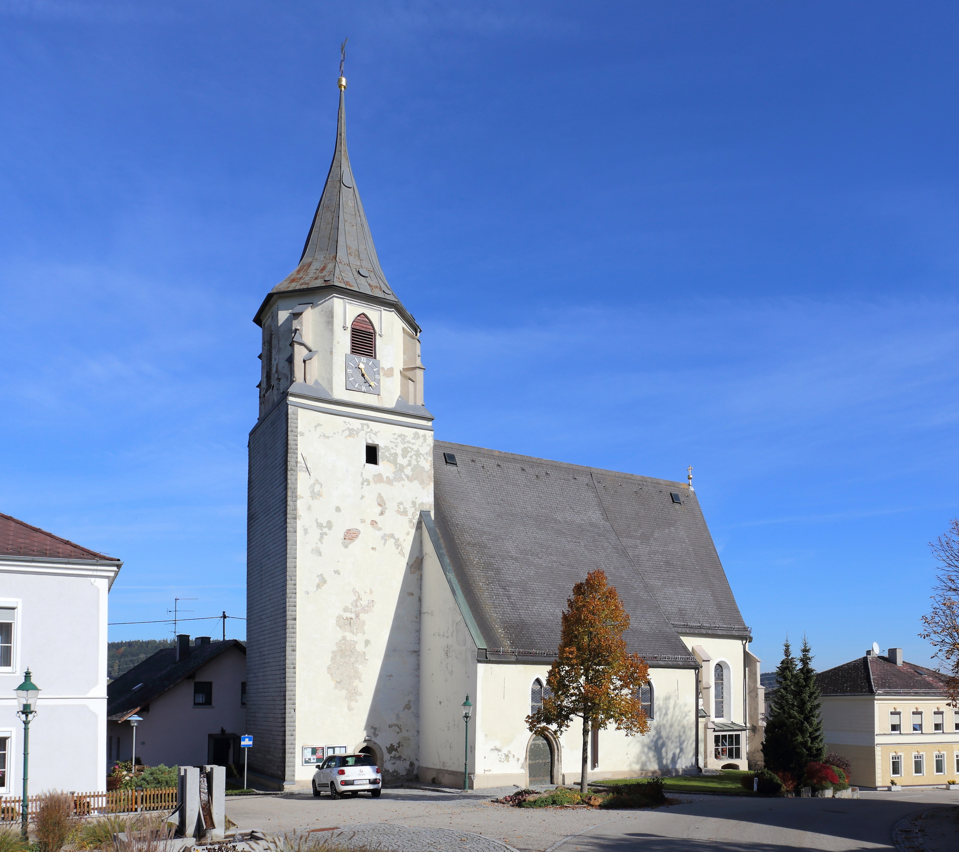 Südwestansicht der katholischen Pfarrkirche Mariä Namen in der oberösterreichischen Gemeinde Wippenham. Eine weiträumige spätgotische Kirche mit einem mächtigen Westturm.